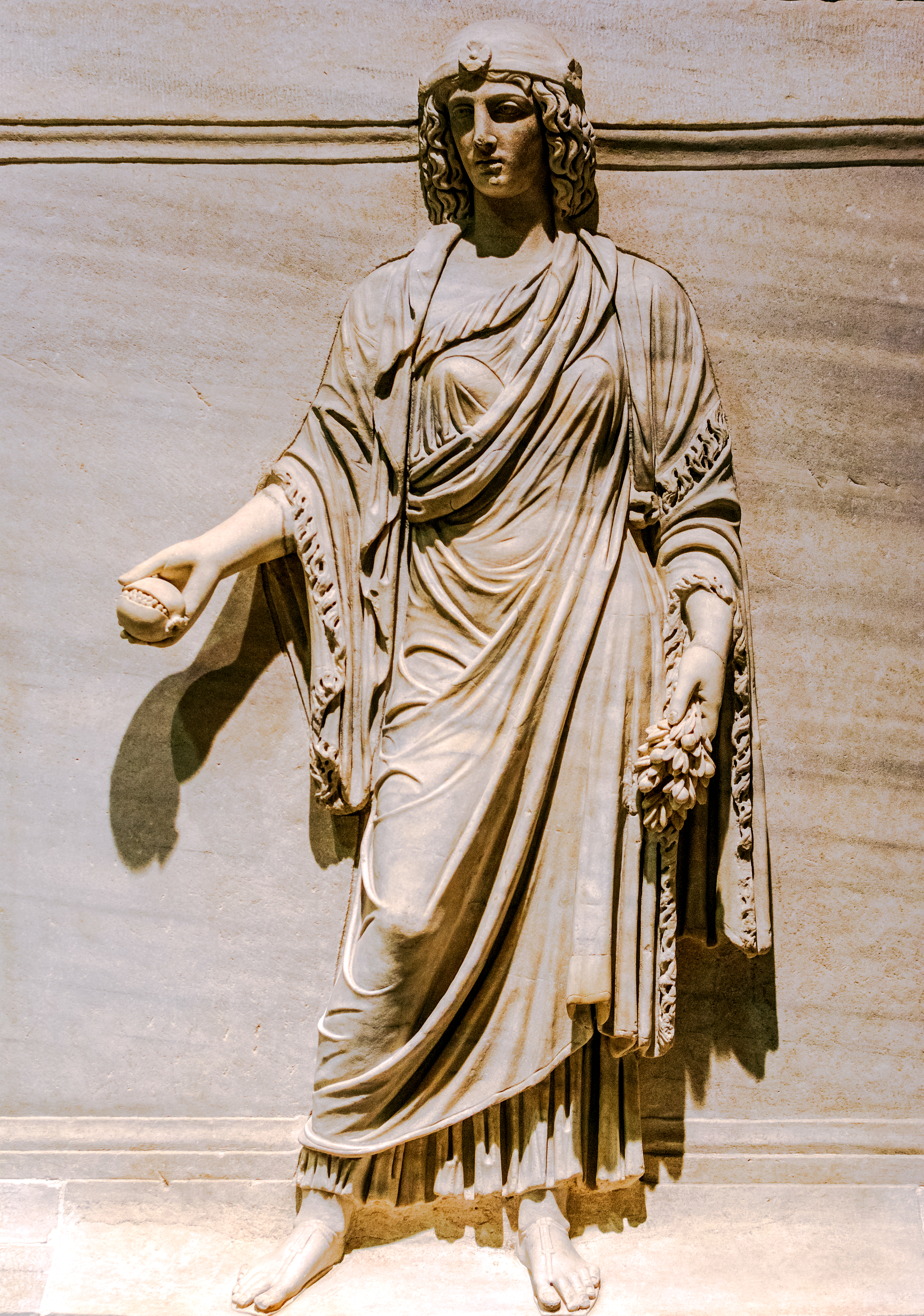 Das Relief, entstanden um das Jahr 145, ist die Personifikation der römischen Provinz Aegyptus. Die Zuordnung konnte durch die Darstellung der Figur als eine Priesterin der Isis (Stil von Mantel und Diadem) erfolgen